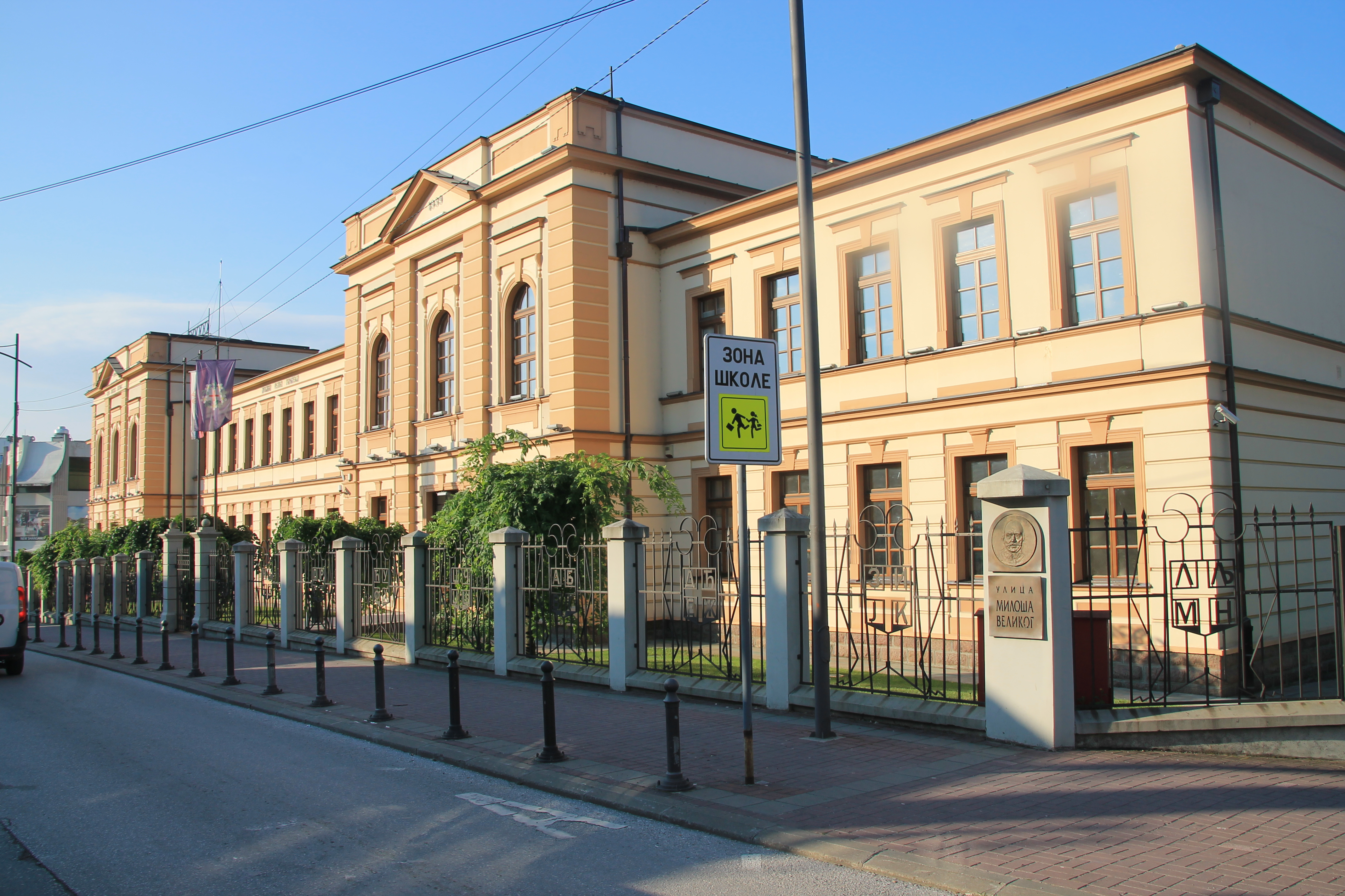 Gimnazija „Takovski ustanak”